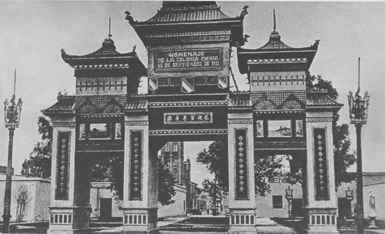 Arco conmemorativo de la Independencia de Guatemala. 1921.